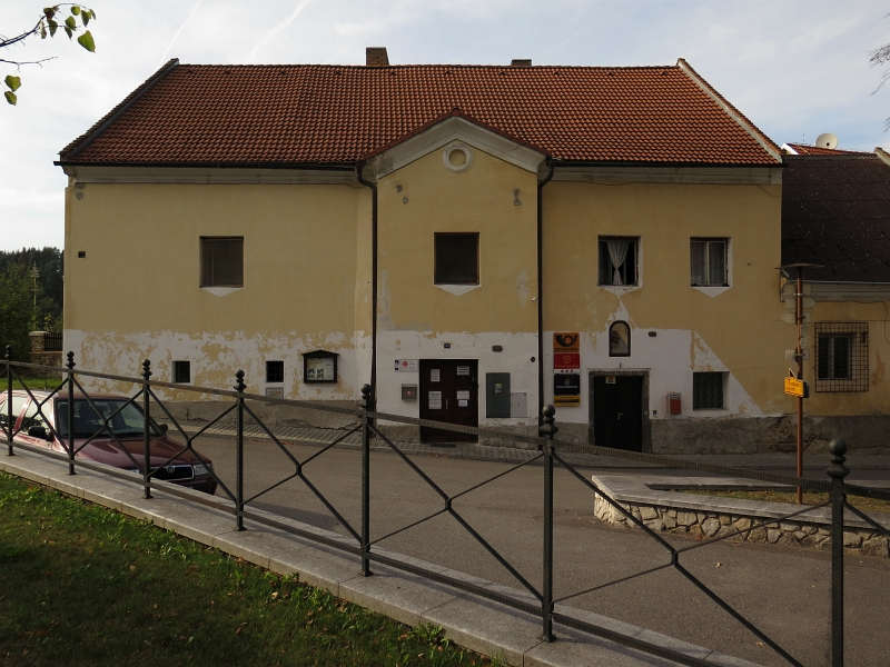 Fara, Záblatí 38, Záblatí (okres Prachatice).